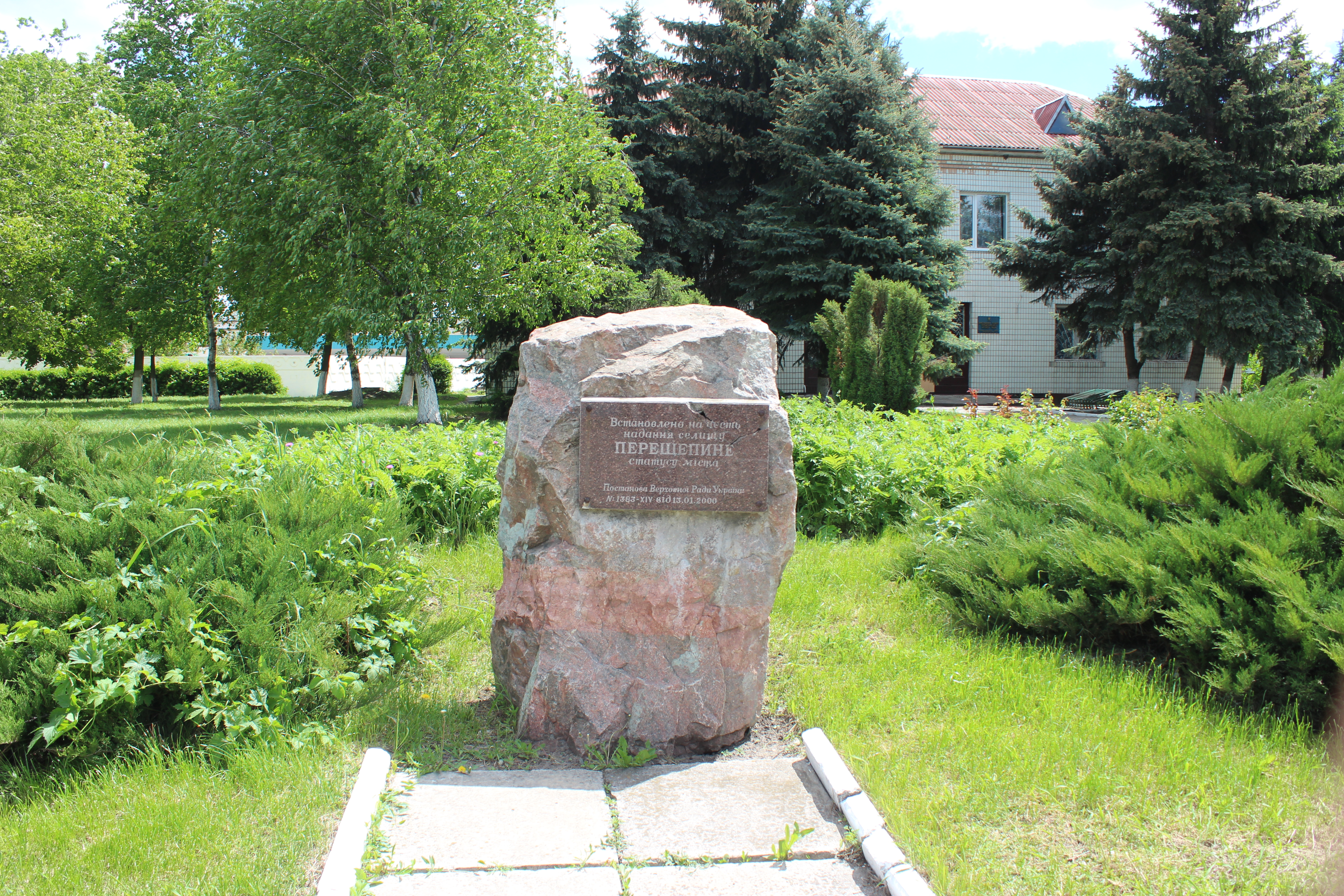 Монумент встановлений на честь надання селищу Перещепине статусу міста